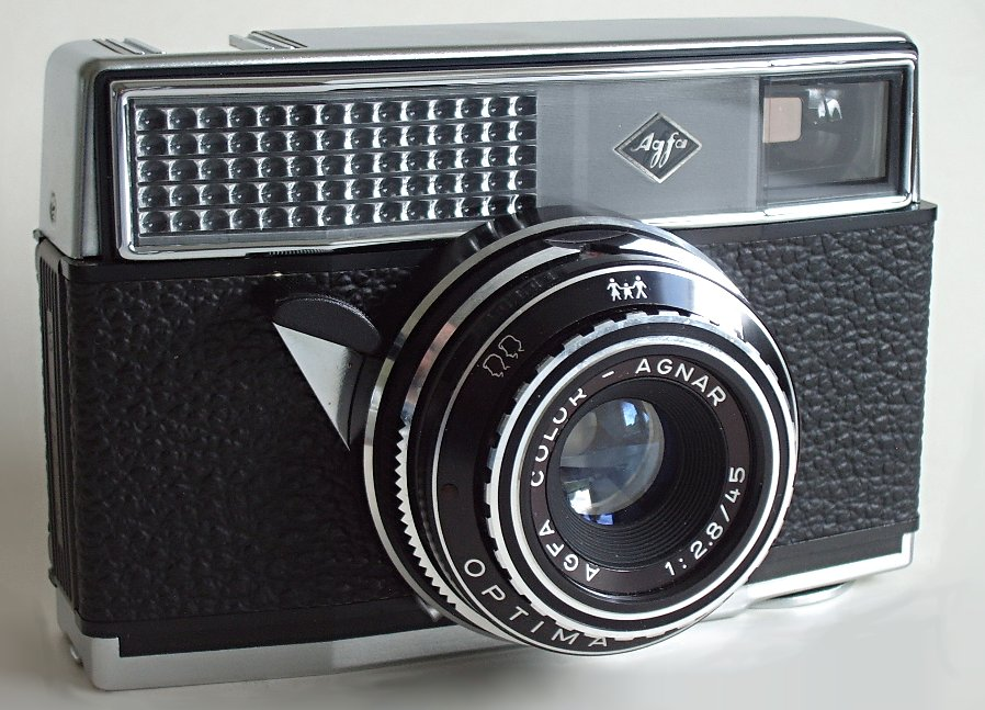 Agfa Optima Rapid 250 camera For Rapid film format. Automatic exposure control. Manual focus control